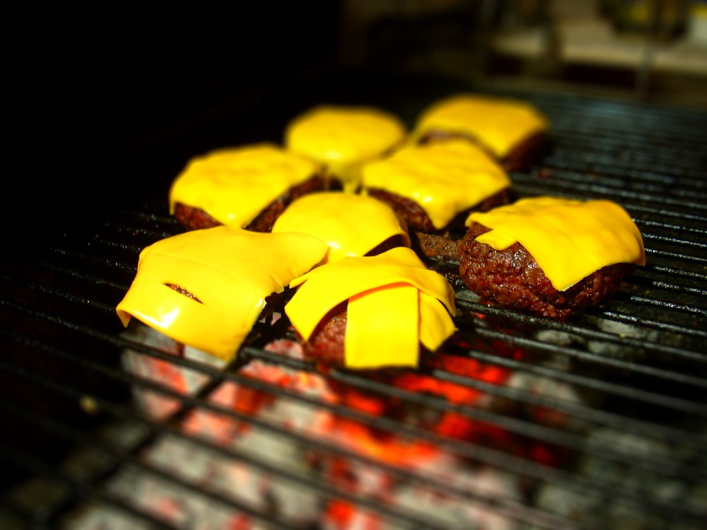 Hamburguesas con queso a la parrilla.